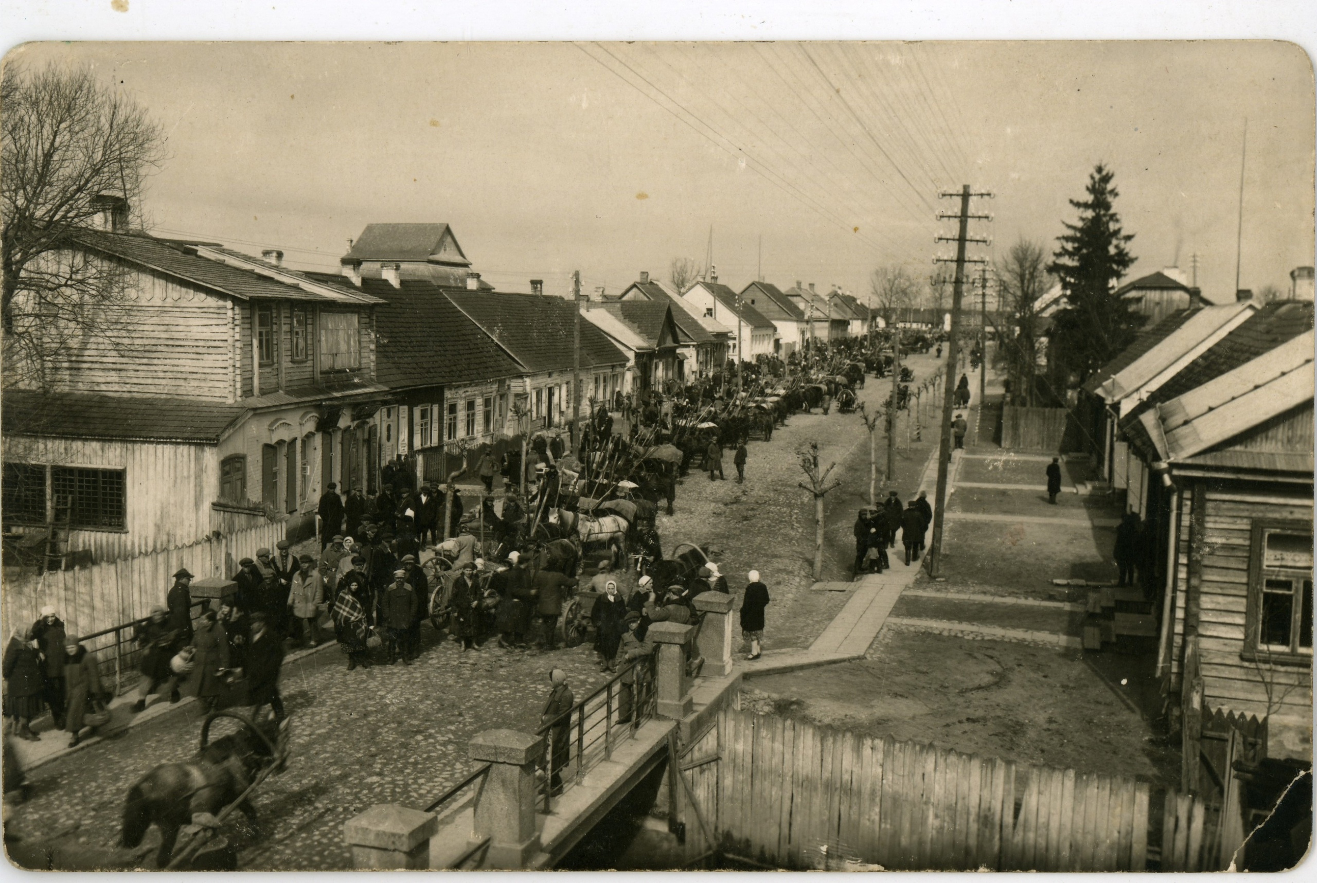 Беларуская (тарашкевіца): Вялейка (Vialejka), вуліца Менская (vulica Mienskaja)